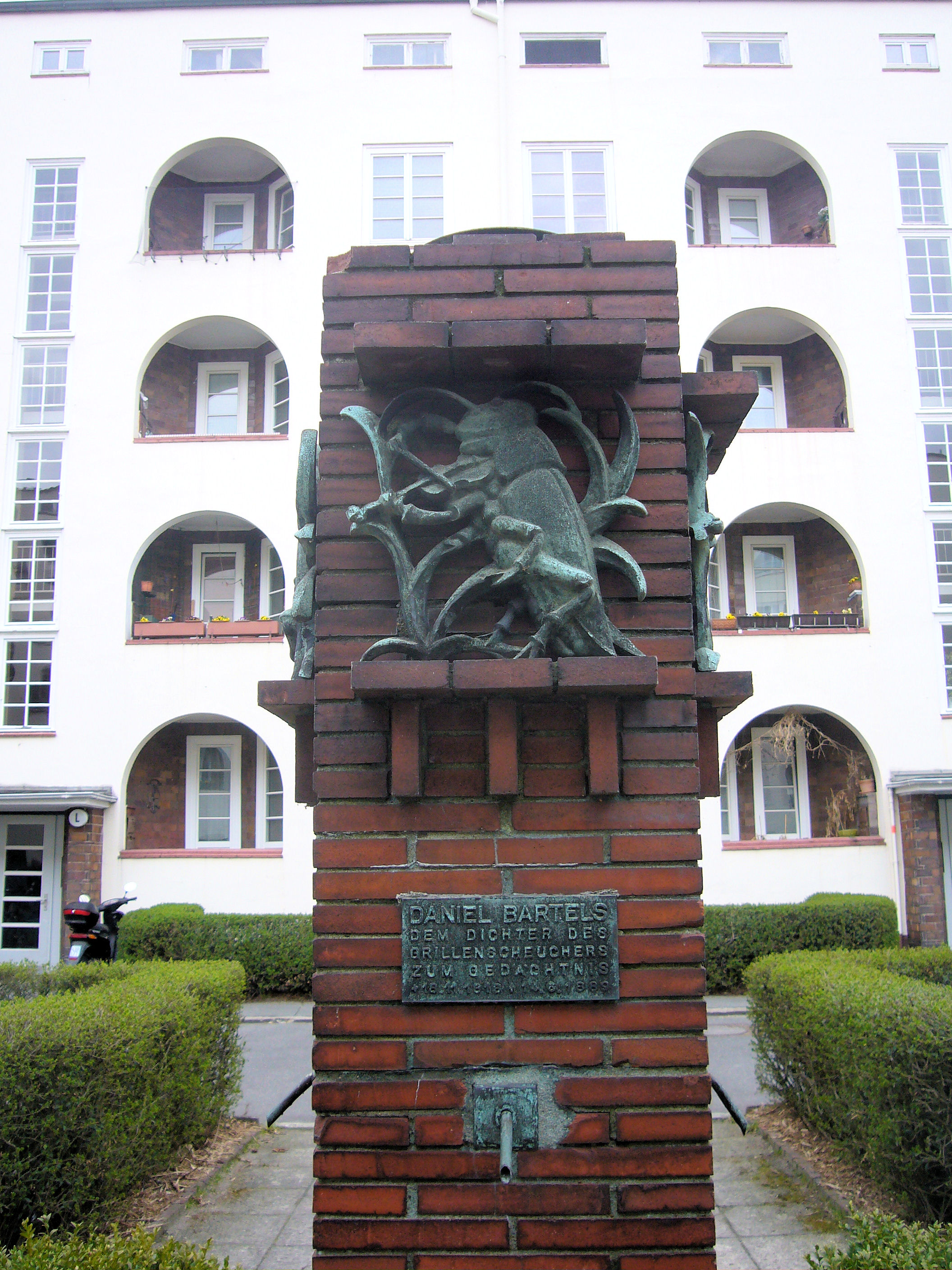 Blick in den Innenhof des Daniel Bartels Hof (Hamburg Barmbek-Süd, Alter Teichweg) mit Denkmal für den Dichter Daniel Bartels (1818-1889), dem Autor des "Grillenscheuchers"